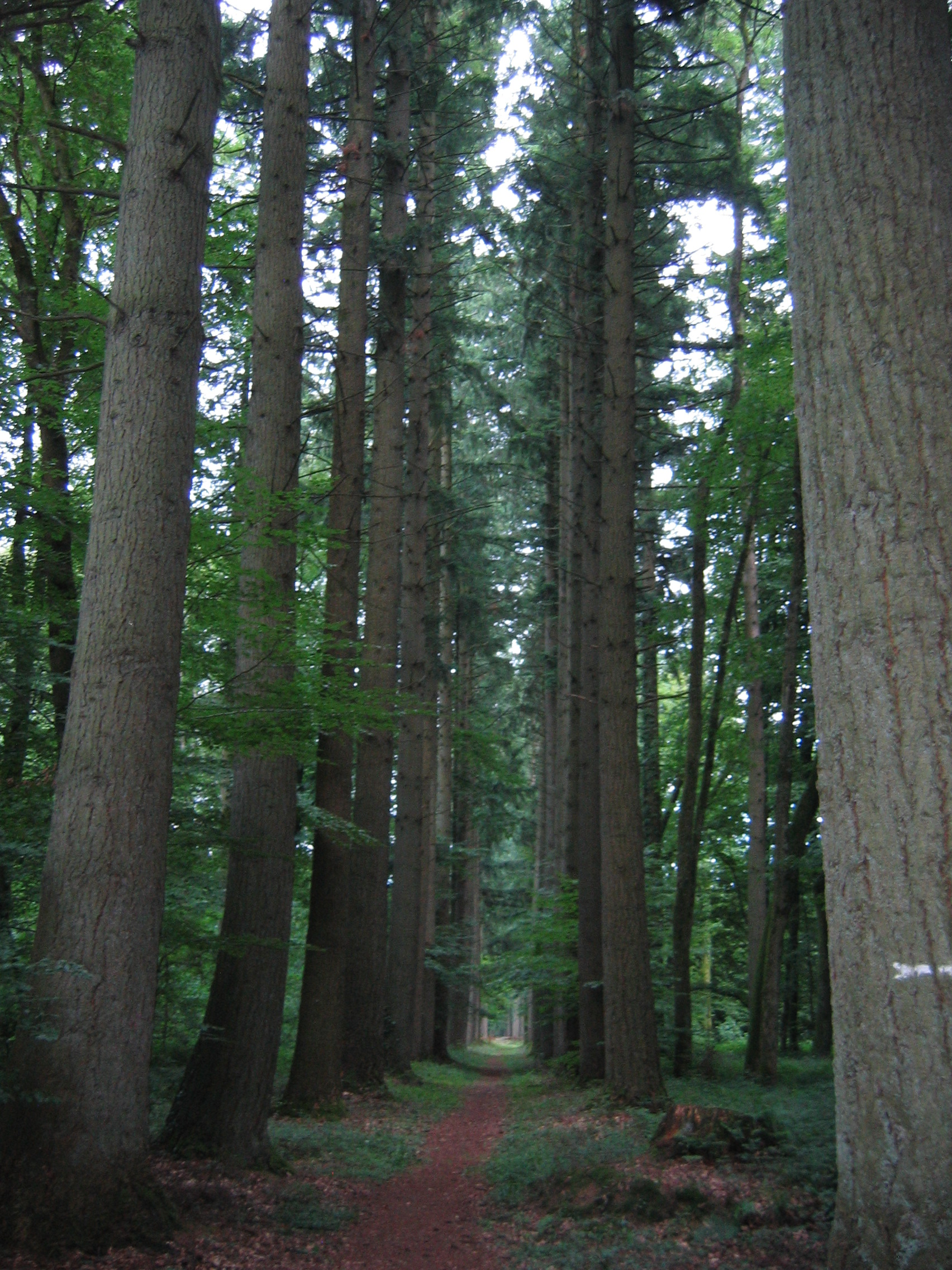 Allée Douglas Arboretum de Vendresse, Ardennes, France